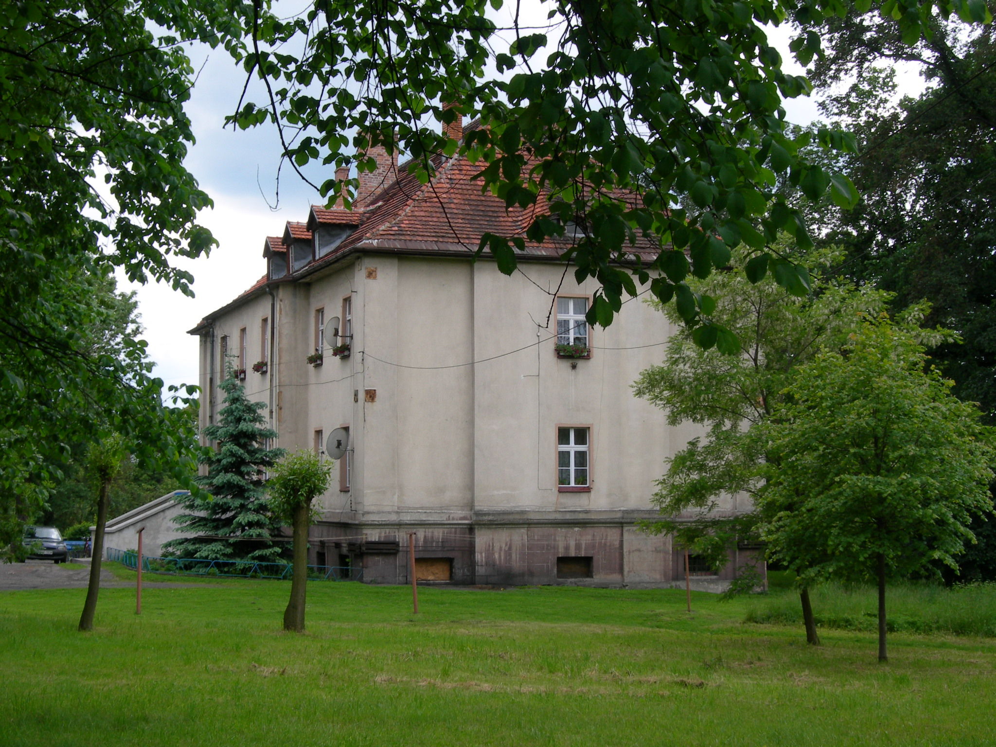 Czuchów - zamek. 2006. Autor: Roman Cop.